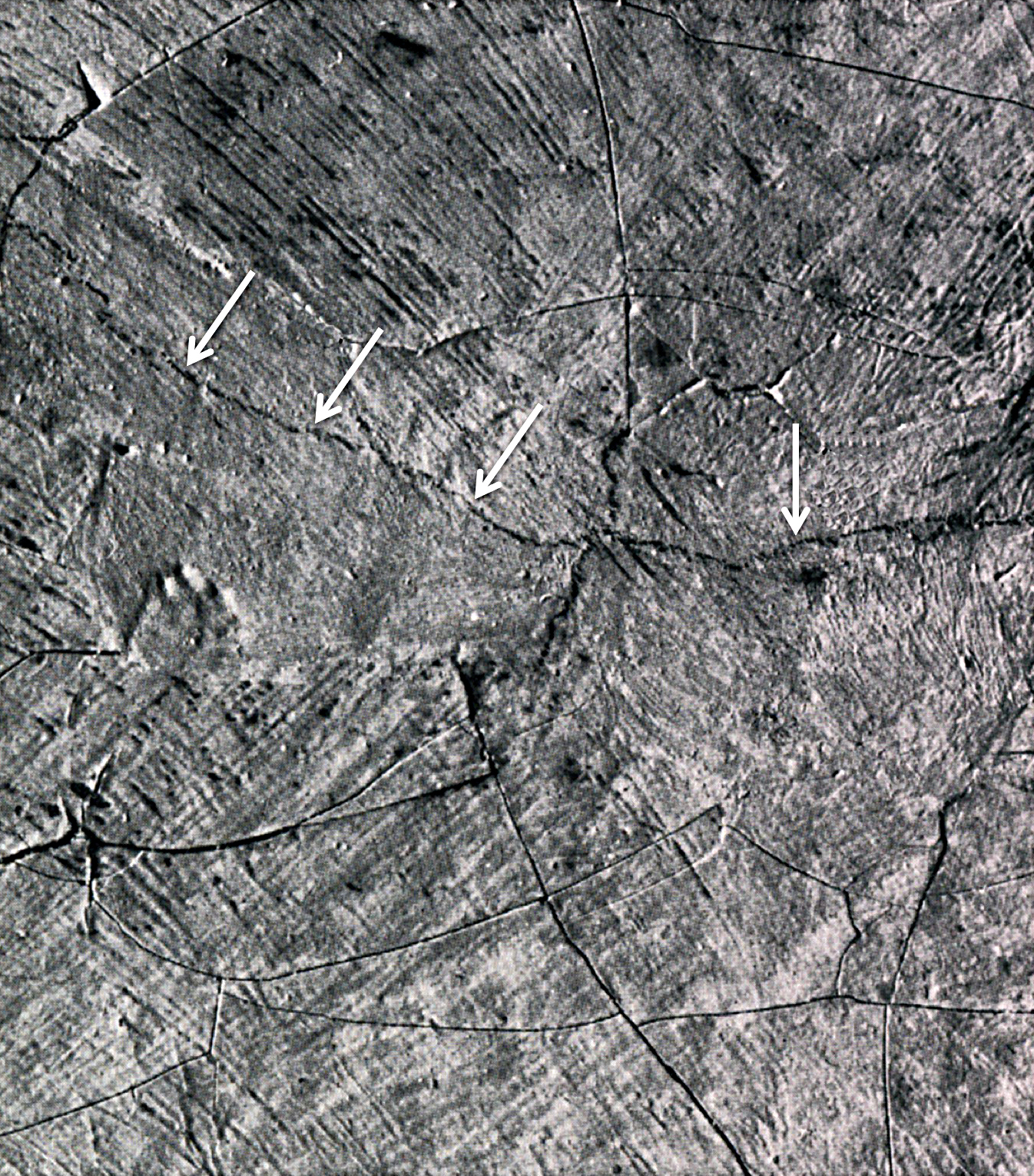 Mit dem Bleistift wurde auf die Retusche eines Gemäldes ein Craquelé aufgezeichnet, damit sie als solche möglichst nicht zu erkennen ist.